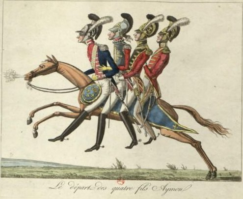 Le départ des quatre fils Aymon, estampe, gravure à l'eau-forte coloriée, 20,4 x 27 cm. Bibliothèque nationale de France. Publié dans Collection de Vinck. Un siècle d'histoire de France par l'estampe, 1770-1870. Vol. 72.